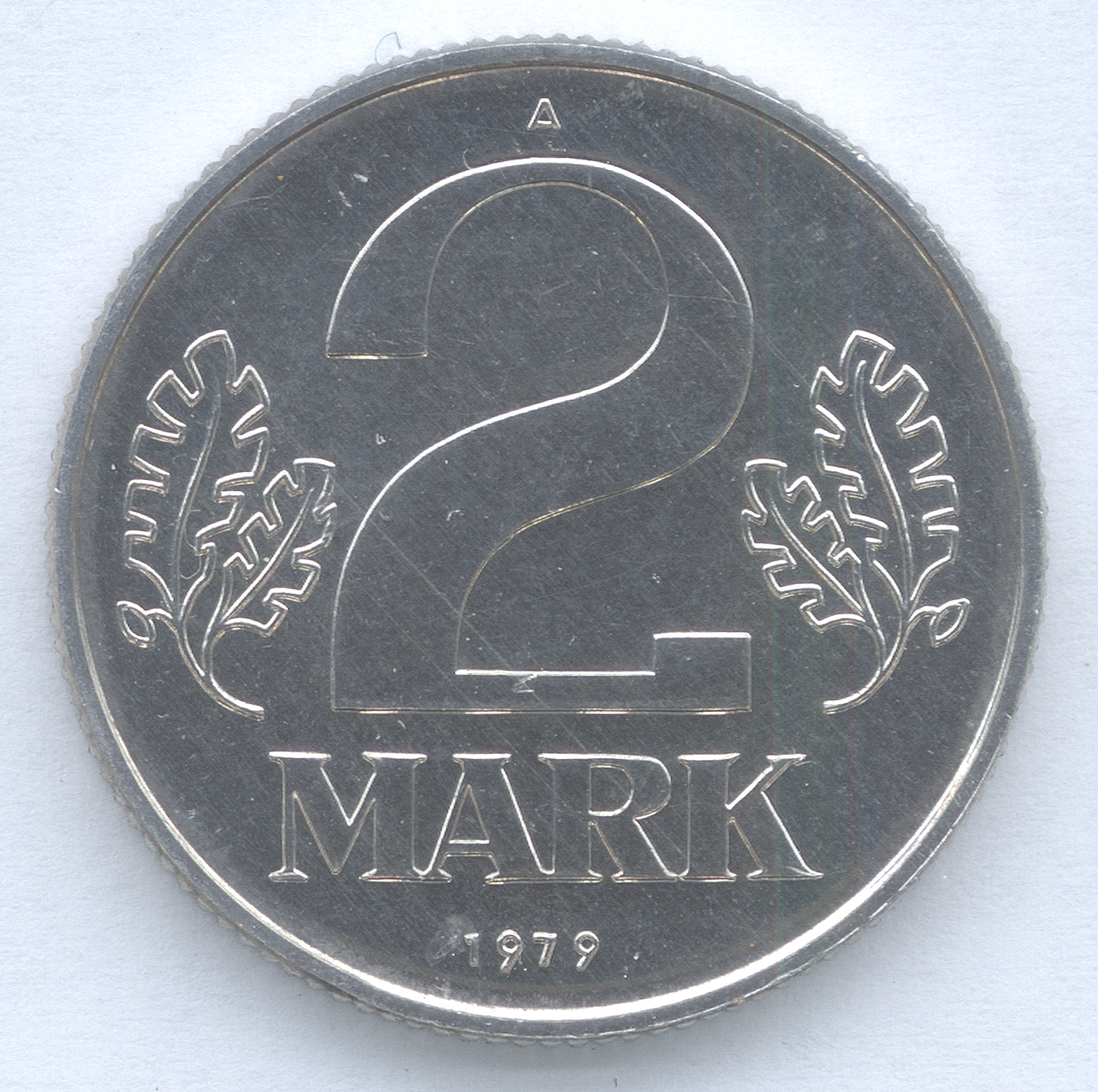 2 Mark DDR Wertseite